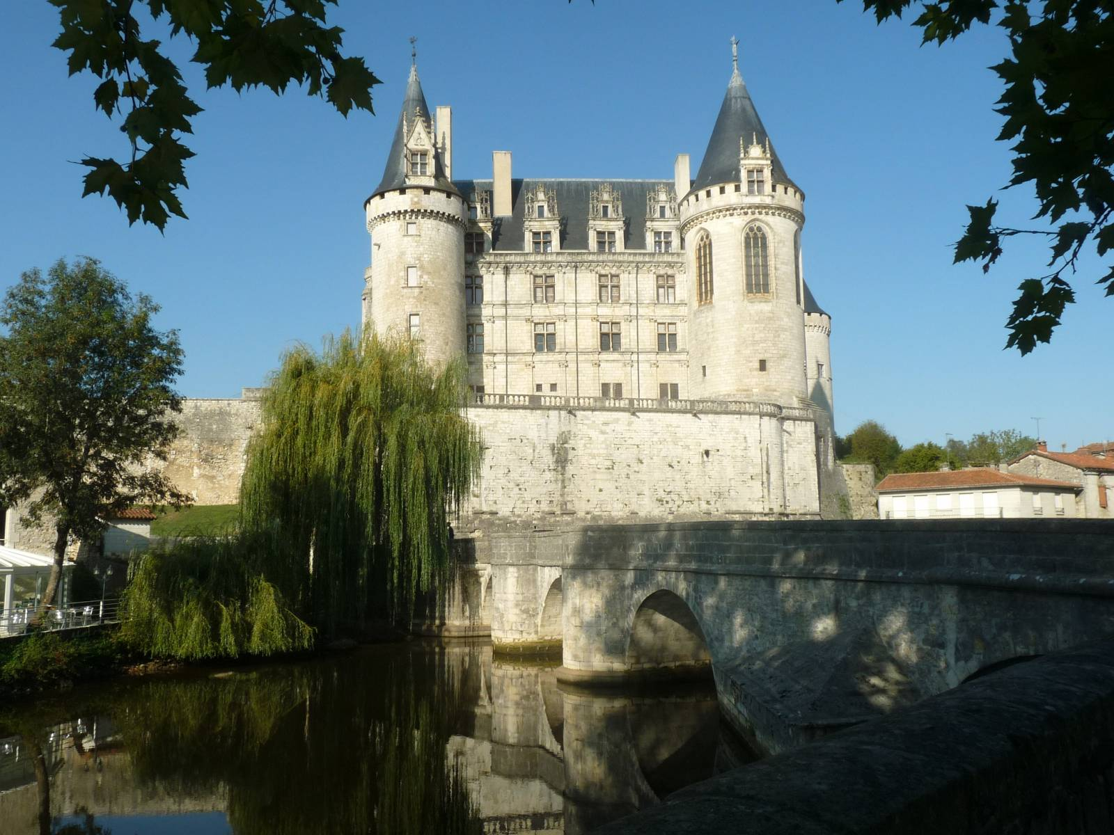 château de la Rochefoucauld (16), France